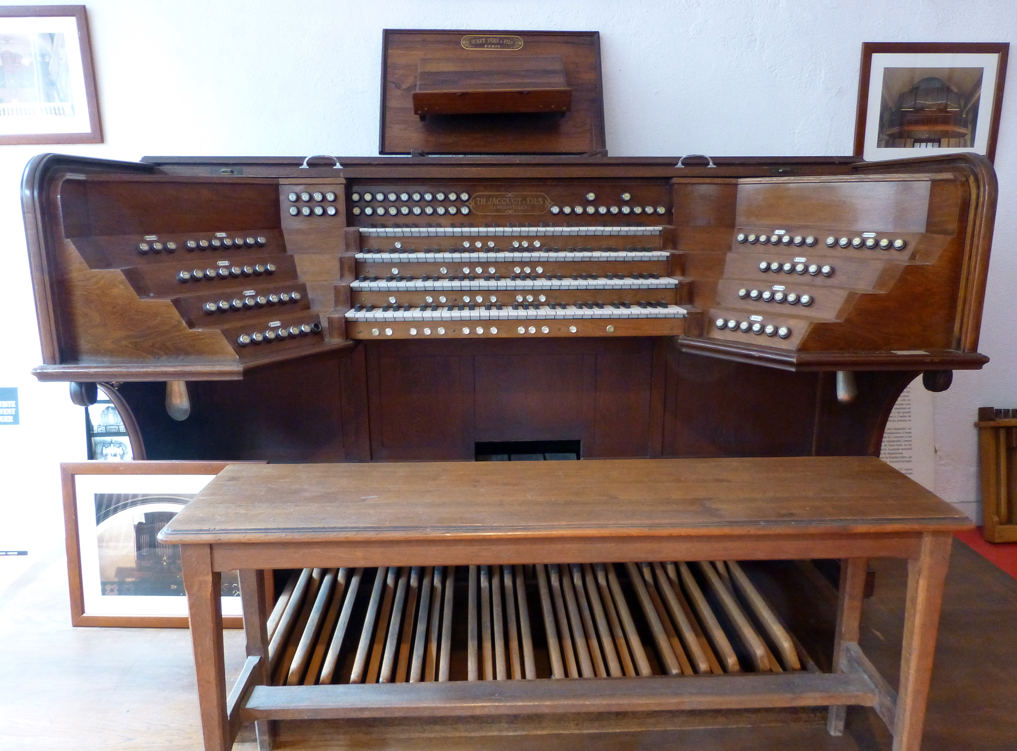 Instruments à la Manufacture vosgienne de grandes orgues (Rambervillers) : ancienne console de la cathédrale de Verdun. Premier modèle console électrique conçu et réalisé par Théodore Jacquot en 1935 ; cette console a été remplacée par la Manufacture en 1987.